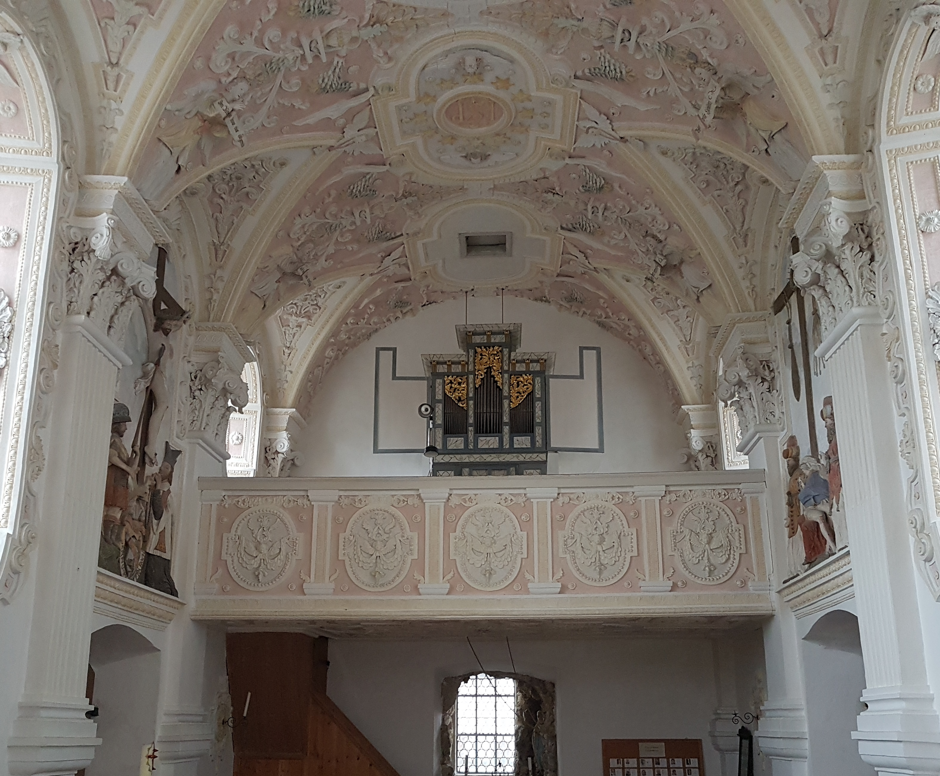 Elbach (Fischbachau), ehemalige Wallfahrtskirche Hl. Blut